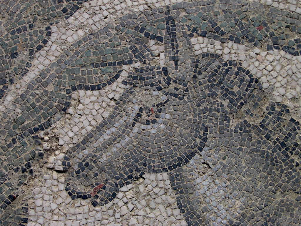 Villa Romana del Casale, Piazza Armerina, Sicily/Sicilia, Italy/Italien